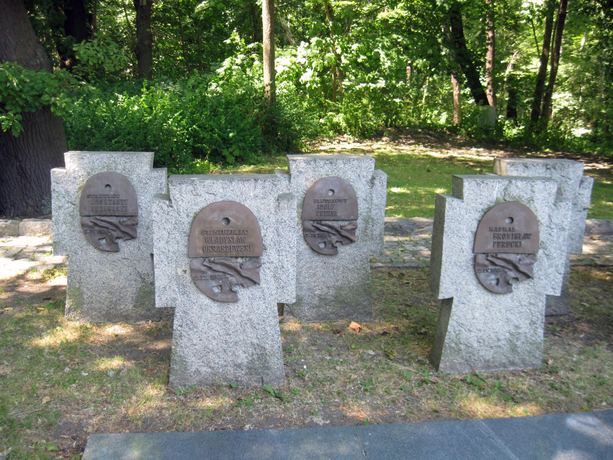 Gdańsk Westerplatte, Cmentarz Żołnierzy Wojska Polskiego. Nagrobki Konstanty Jezierski, Władysław Okraszewski, Adolf Petzel, Bronisław Perucki.